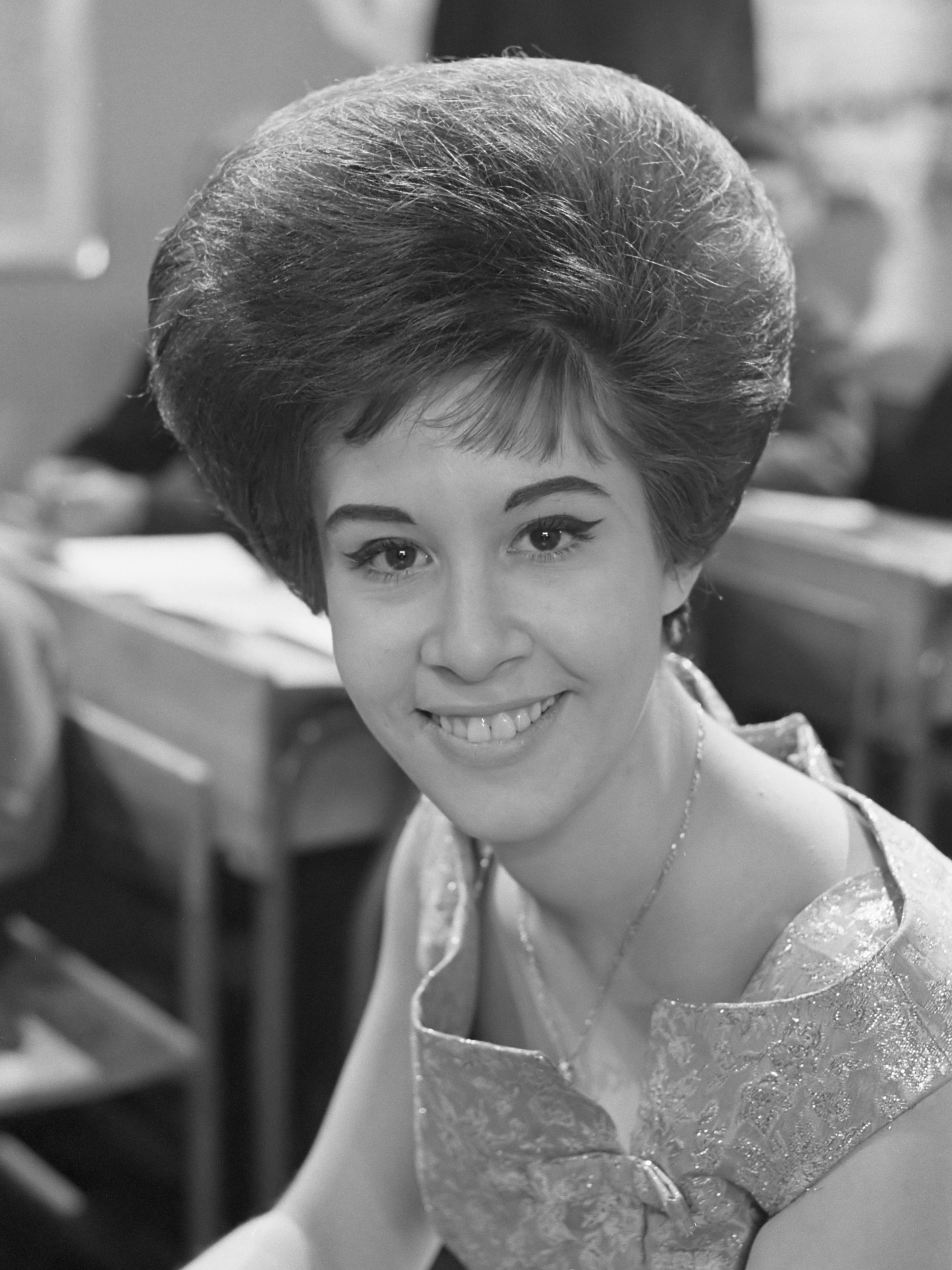 Rudi Carrellshow , nr. 9 Rudi, Helen, Rocco, 10 en 11 Helen Shipiro (kop) 8 maart 1963